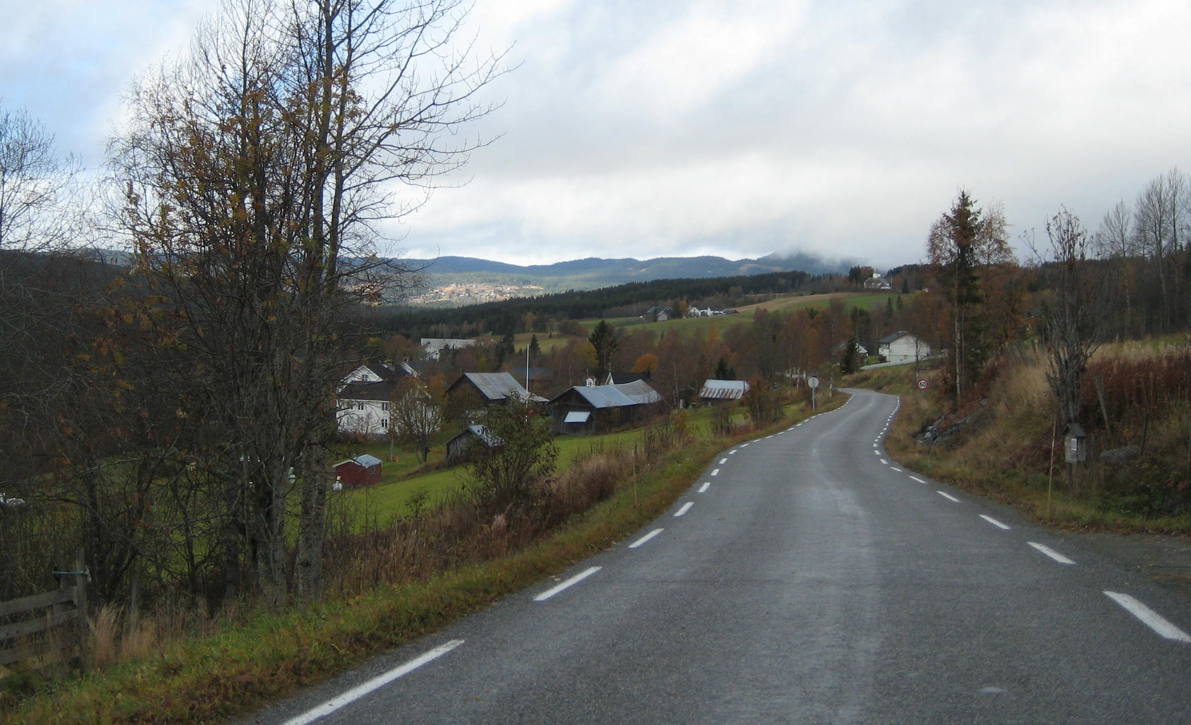 Fylkesveg 2432 (tidl. 193), Vest-Torprunden. Harstad foran. Midten bak Lunde kirke. Helt bak til venstre sees Sæterbygda.